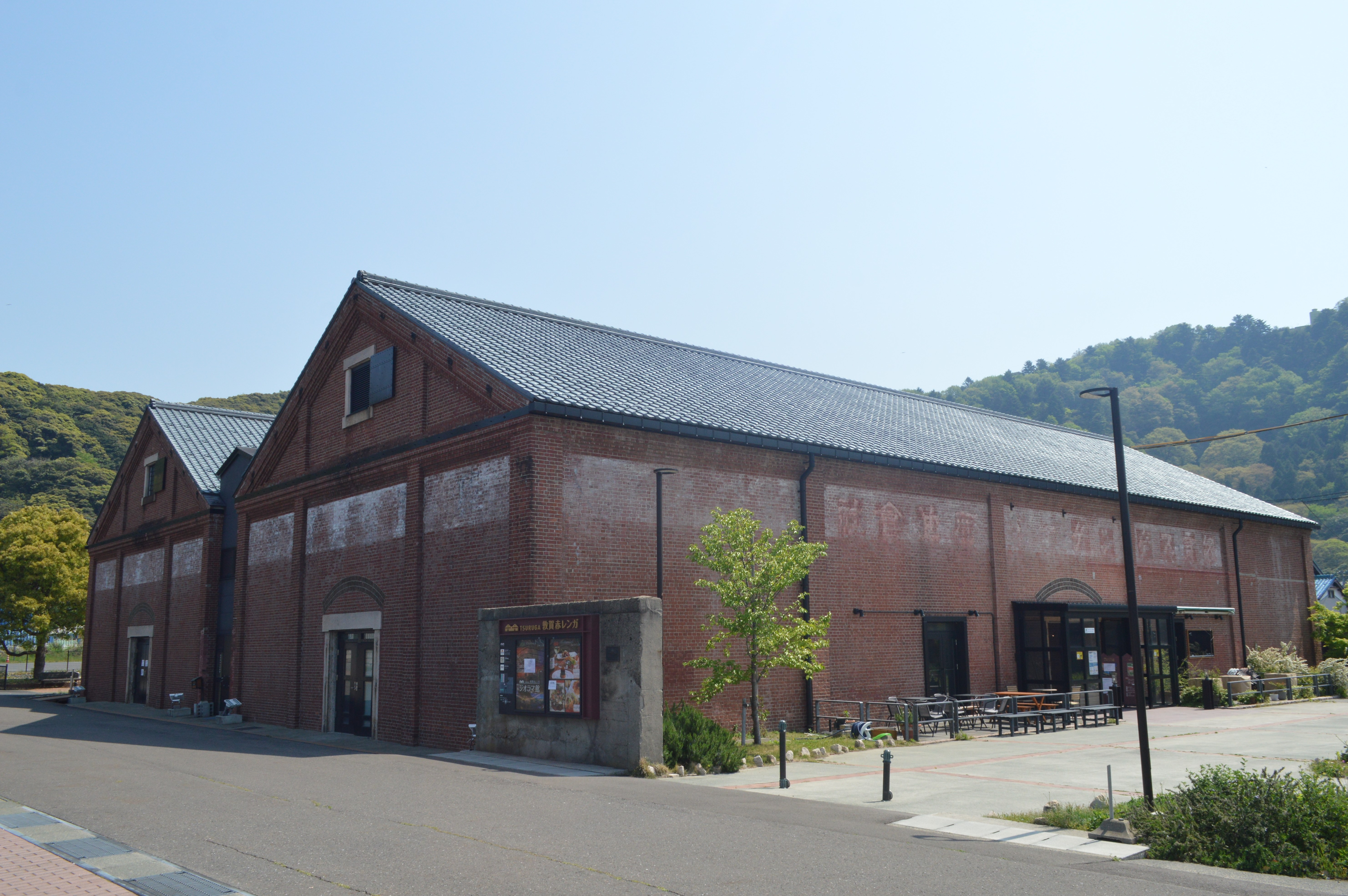 福井県敦賀市金ケ崎町4-1にある敦賀赤レンガ倉庫。登録有形文化財。